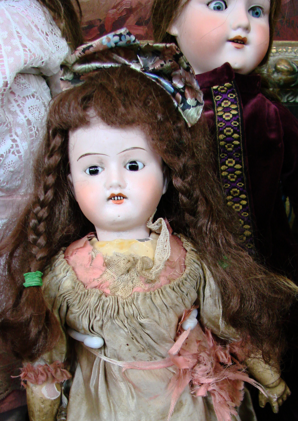 Poupées anciennes